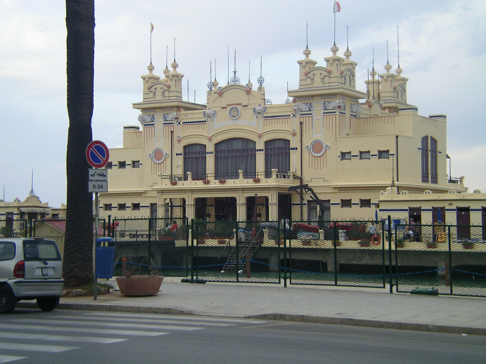 Das Stabilimento (Mondello)